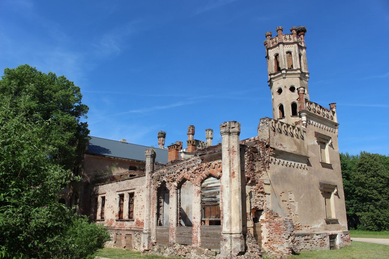 Skats uz torni no dārza puses vasarā.